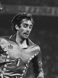 Match de football Pays-Bas - Belgique (3-0) à Rotterdam. Tour préliminaire de la coupe du monde en Espagne. Walter Meeuws.